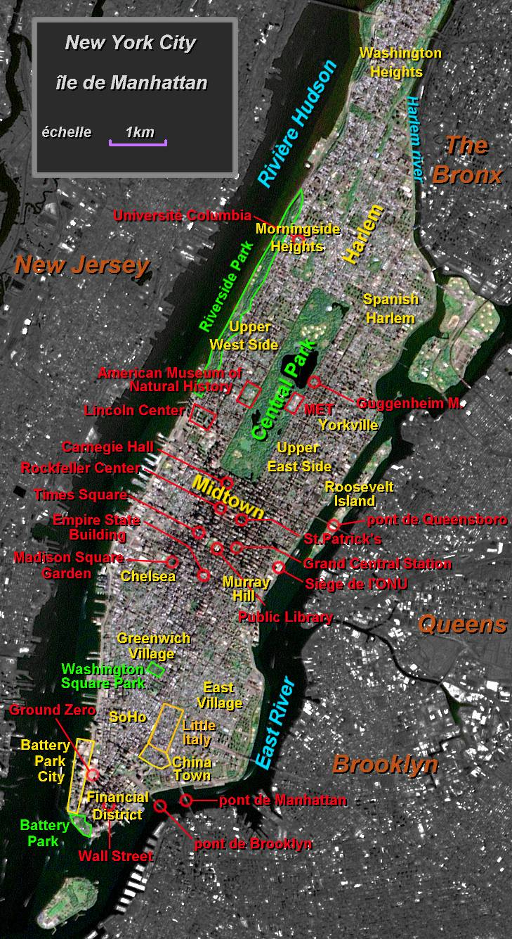 Manhattan map